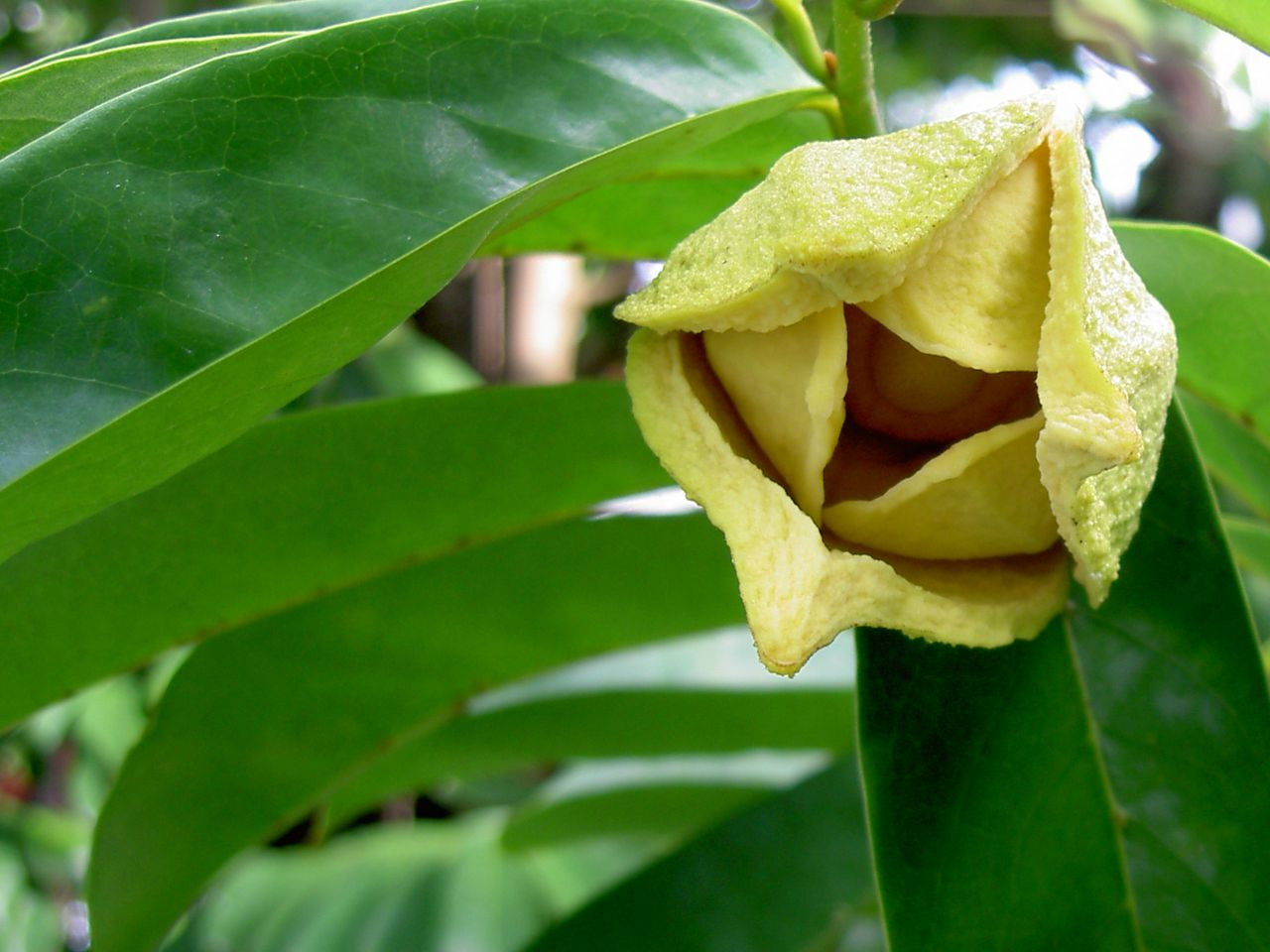 Fleur de corossolier.